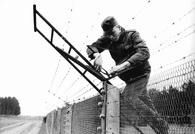 ADN-ZB-Pätzold-3.1.90-Bez. Schwerin: Pioniere der Grenztruppen der DDR begannen in Horst mit dem Abbau von Grenzsicherungsanlagen zwischen der DDR und der BRD. In den kommenden Wochen sollen in der Nähe von Ortschaften und Übergangsstellen weitere Sperren demontiert werden.